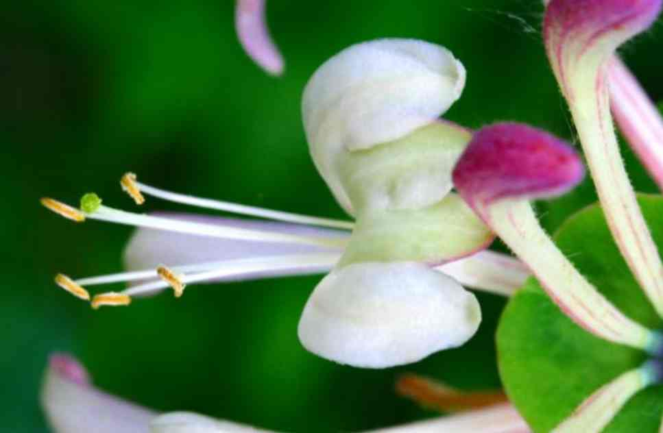 Lonicera caprifolium